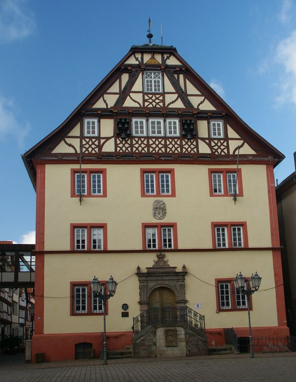 Rathaus von Rotenburg, als Renaissancebau erbaut zwischen 1597 und 1598. 1637 brannte es aus und wurde 1656 mit Fachwerkgiebel neu aufgebaut.